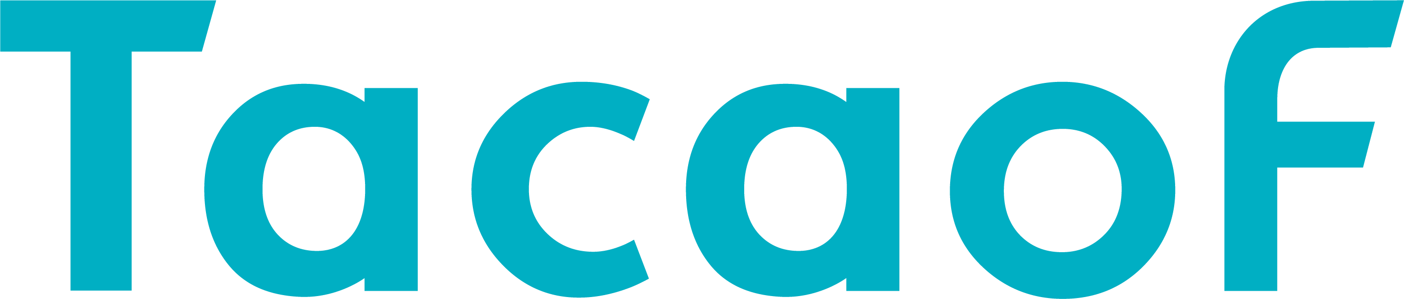 新ロゴ（2019年3月1日～）